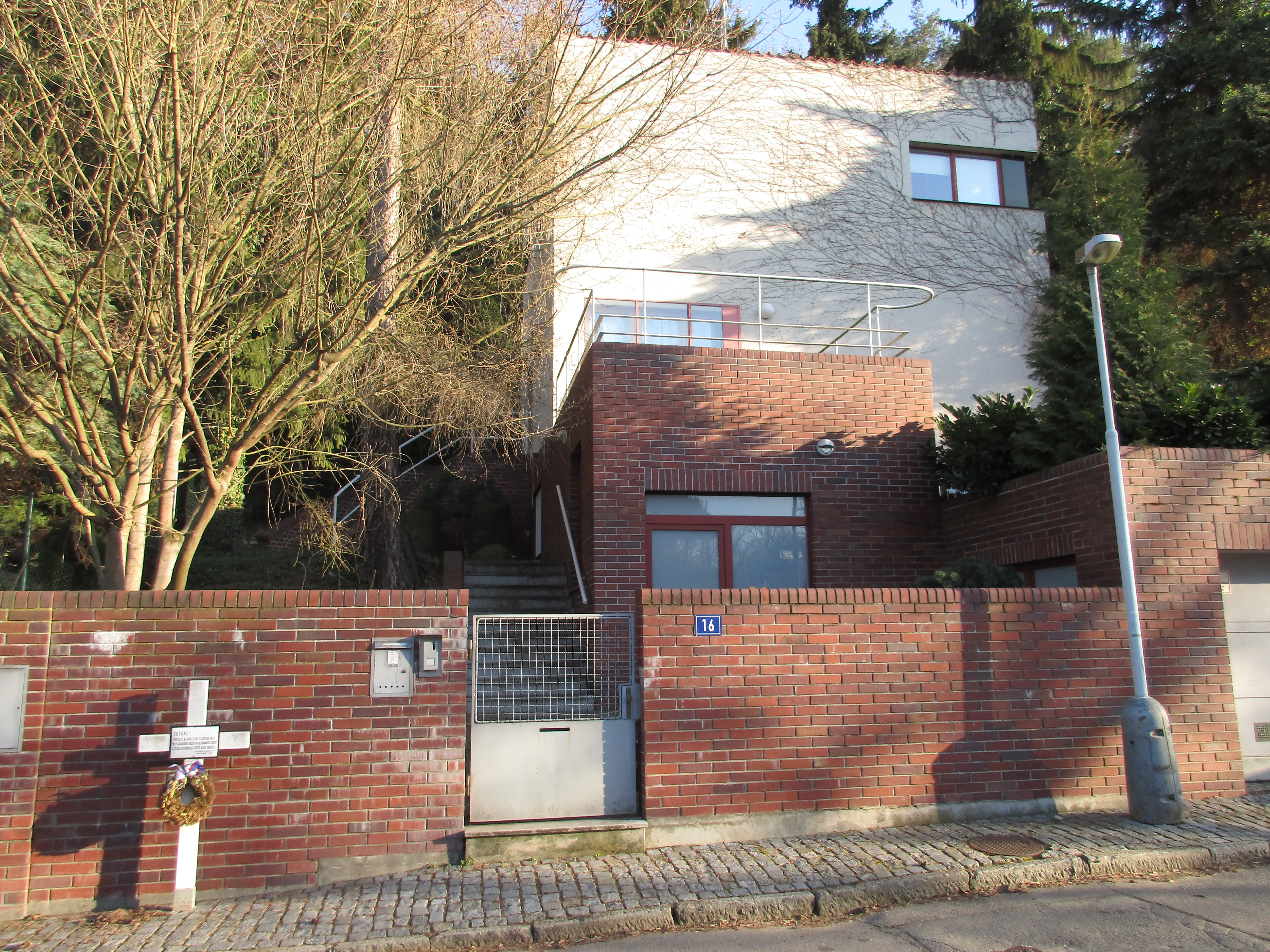 Pod Habrovou 350/16, Praha 5-Hlubočepy